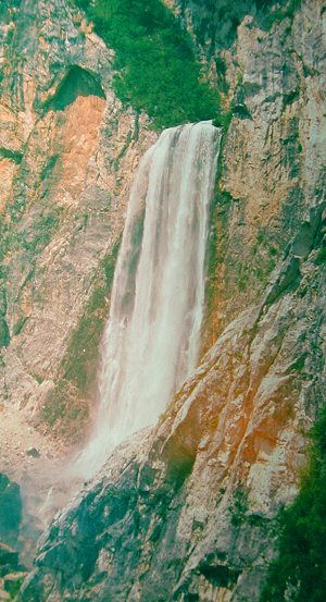 Slap Boka Foto Boštjan Burger, januar 2005